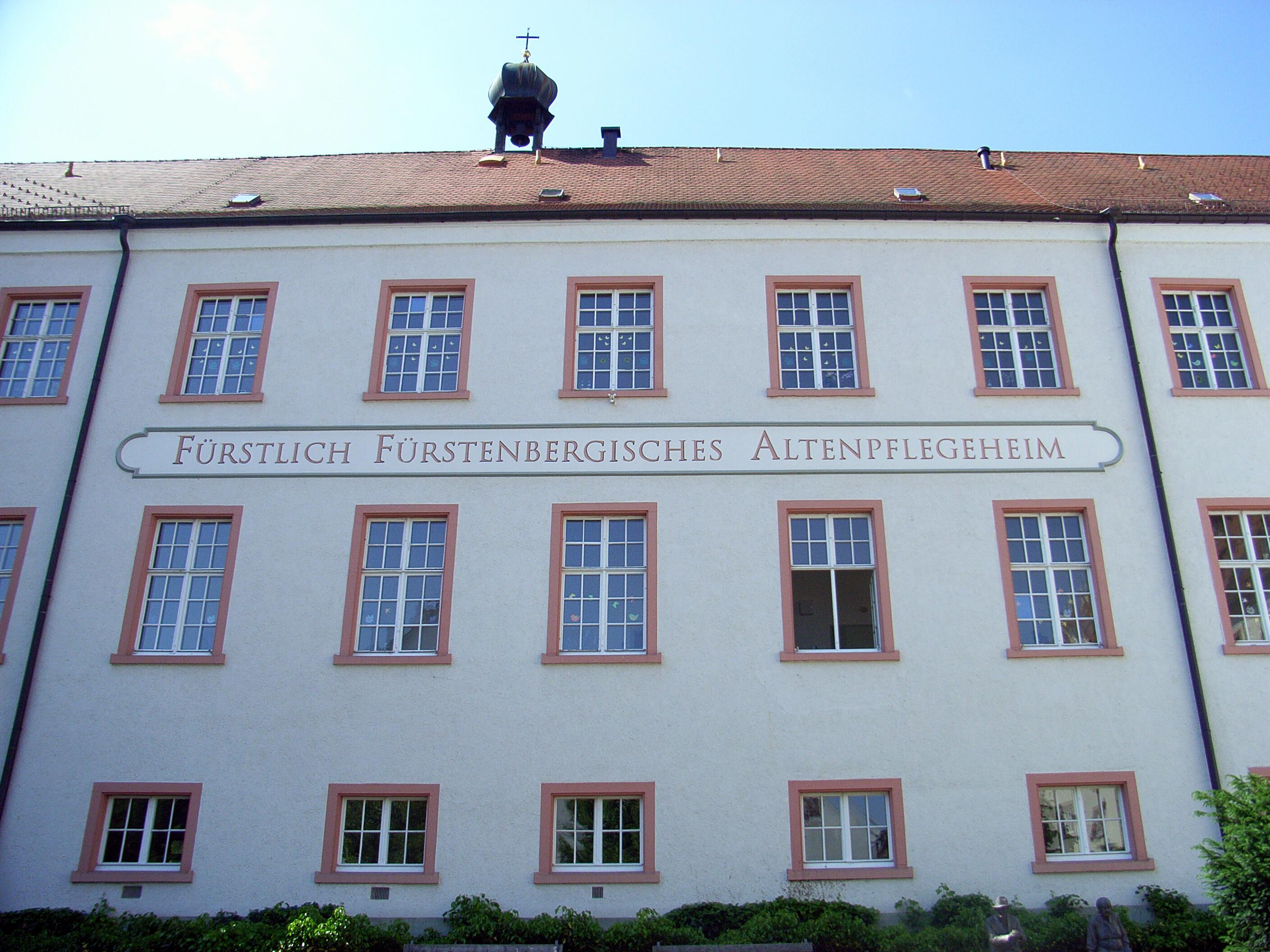 Dieses Bild zeigt das Obere Schloß in Hüfingen.